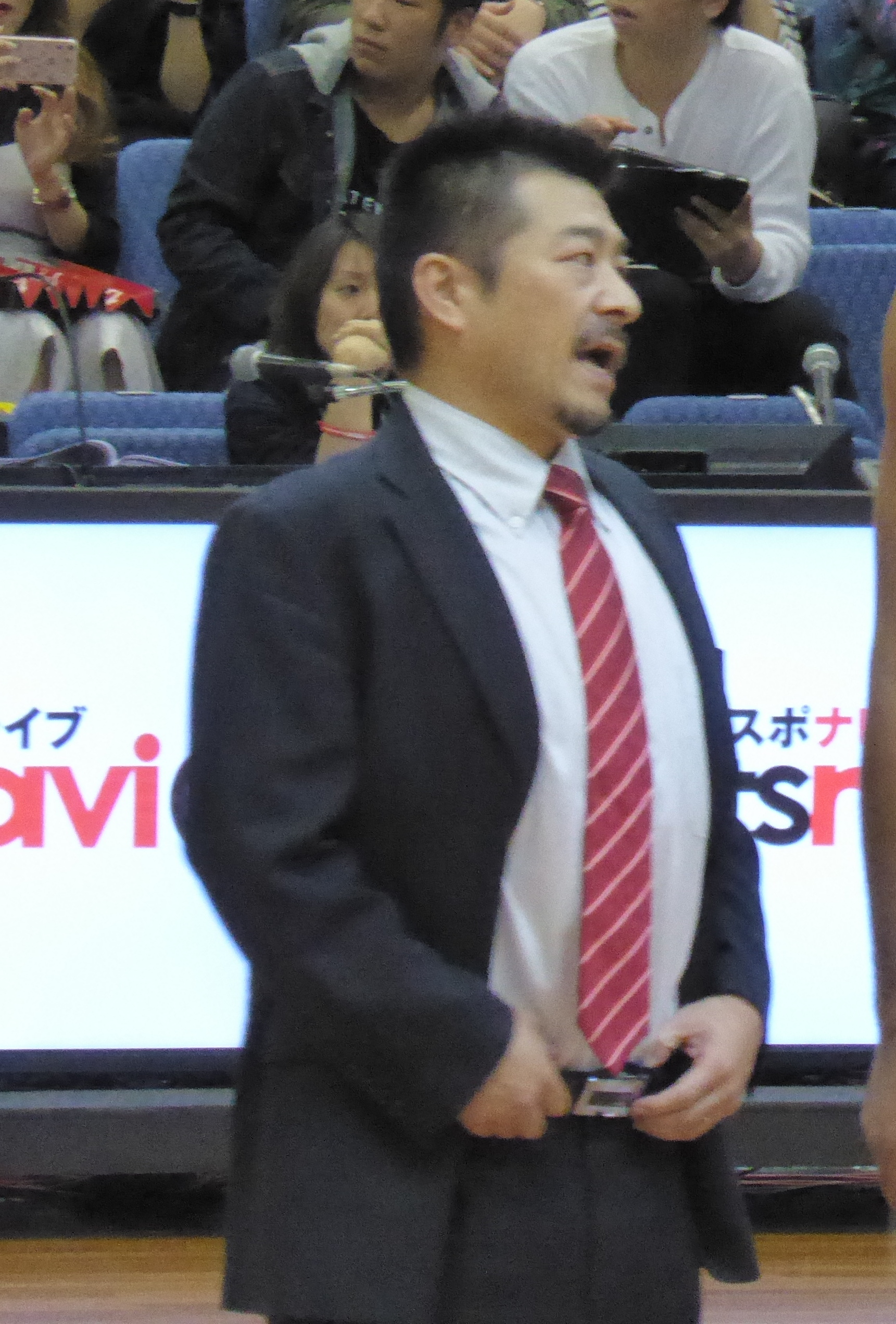 バスケットボール